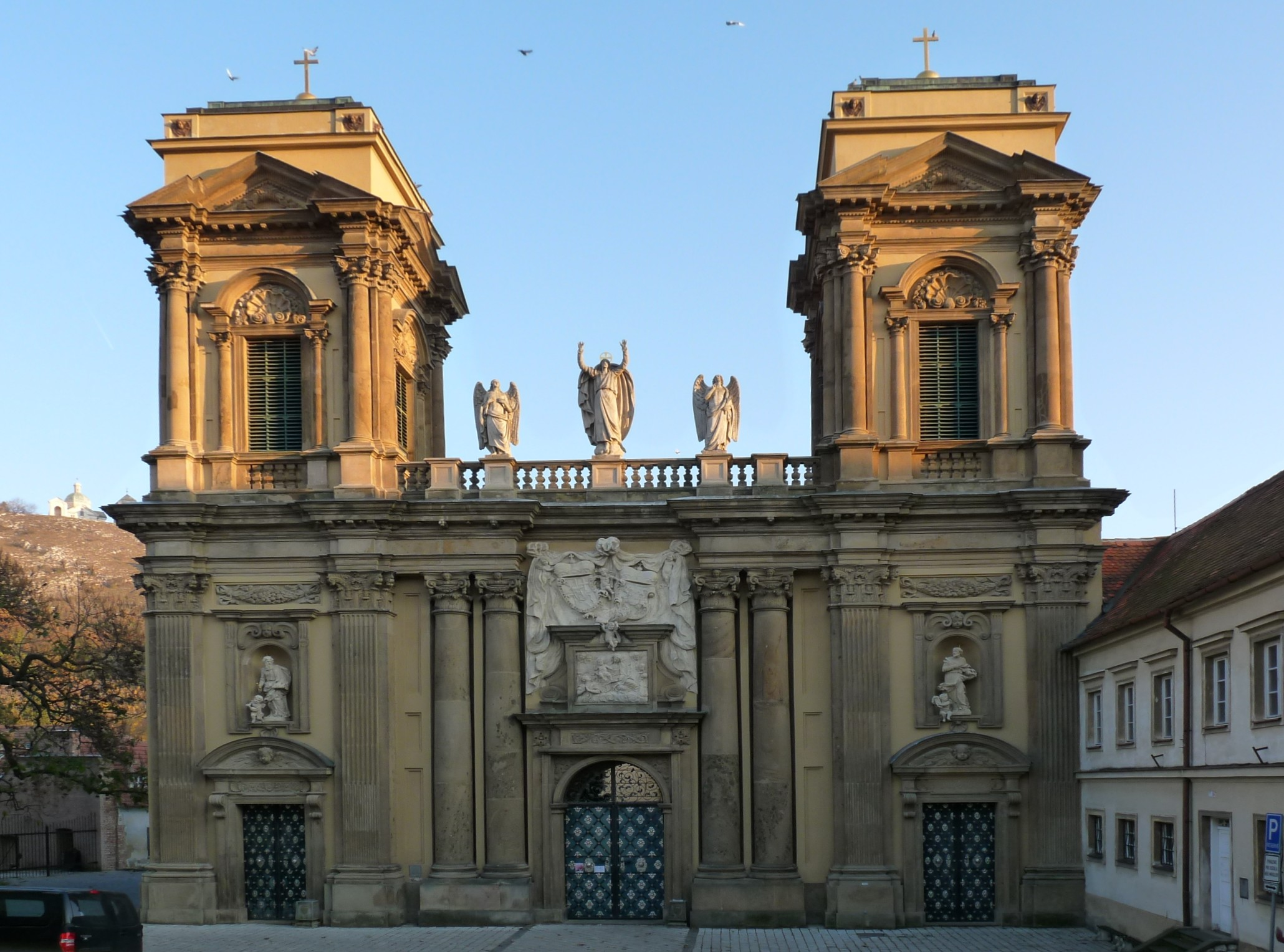 Pohřební kaple Dietrichštejnská hrobka (Mikulov), Náměstí 193/5, Mikulov